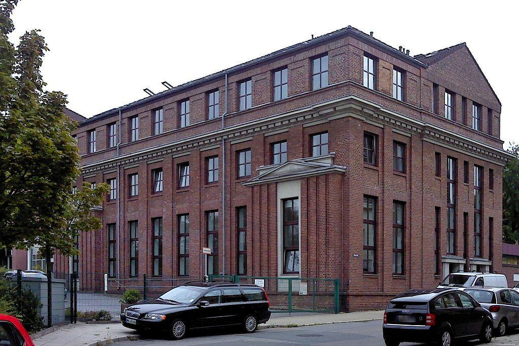 Verwaltungsgebäude der ehem. Zeche Graf Beust im Essener Ostviertel; unter Denkmalschutz